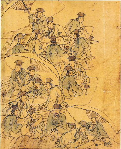 조선의 과거 시험장 (18세기 민화)